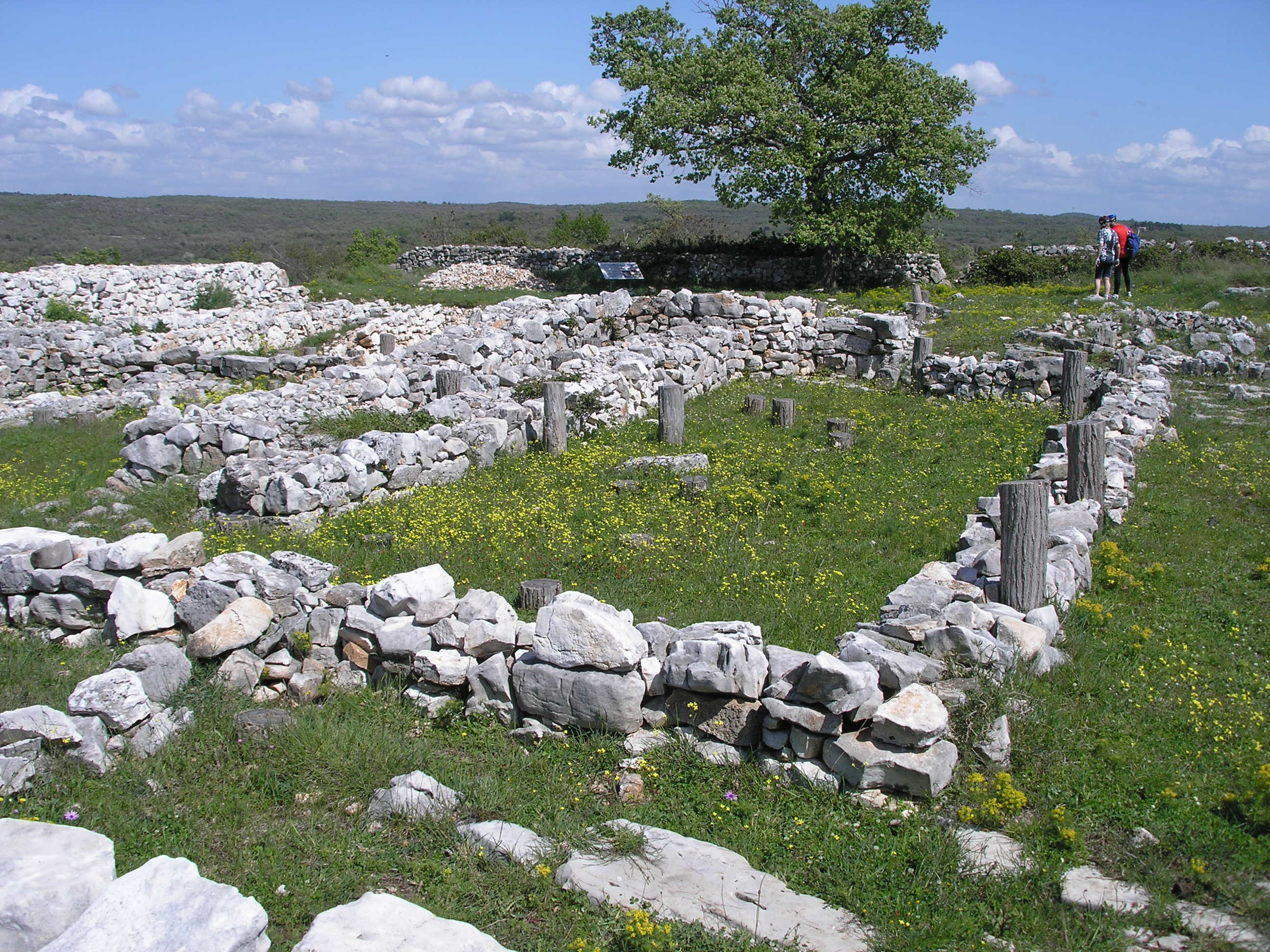 Monkodonja (Moncodogno) archaeological site in Istria